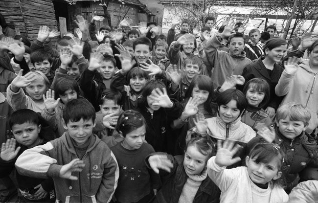 Косово и Метохија: Мали Срби и неалбанци шаљу поздрав свету из места Церница код Гњилана.Фотографије из пројекта "Корени душе". Фото:Дарко Дозет